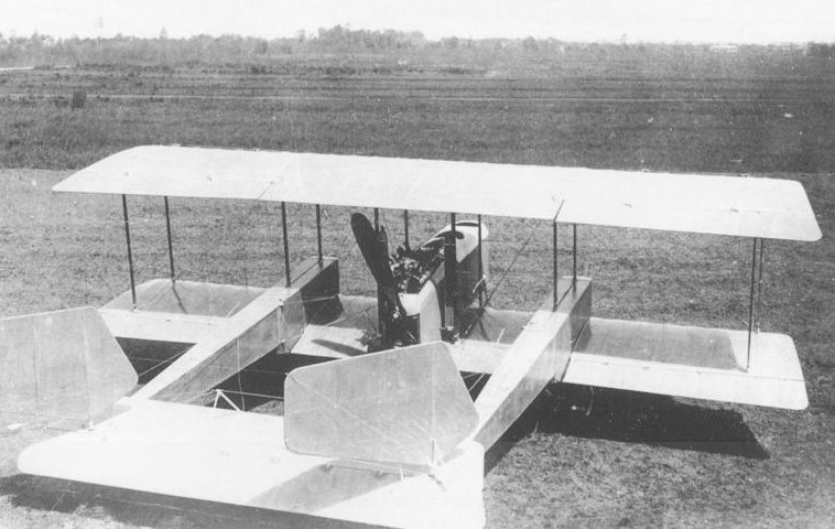 Caproni Ca.37 visto posteriormente